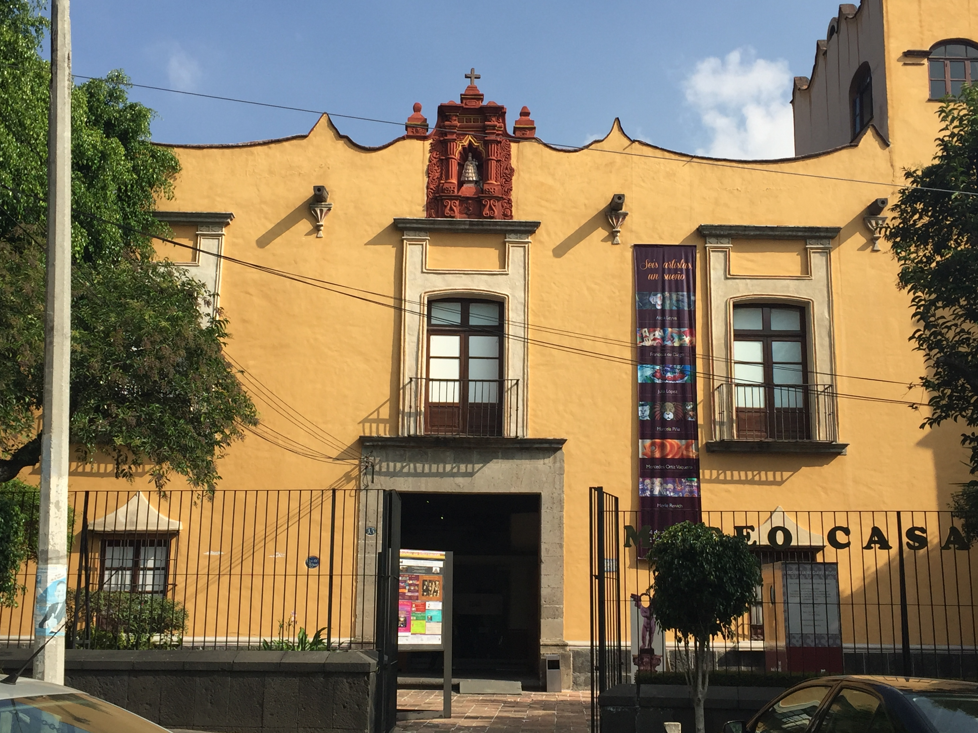 Fachada de la entrada al Museo Casa del Risco, también conocido como Centro Cultural Isidro Fabela frente a la Plaza San Jacinto en el centro de San Ángel, Distrito Federal, México.